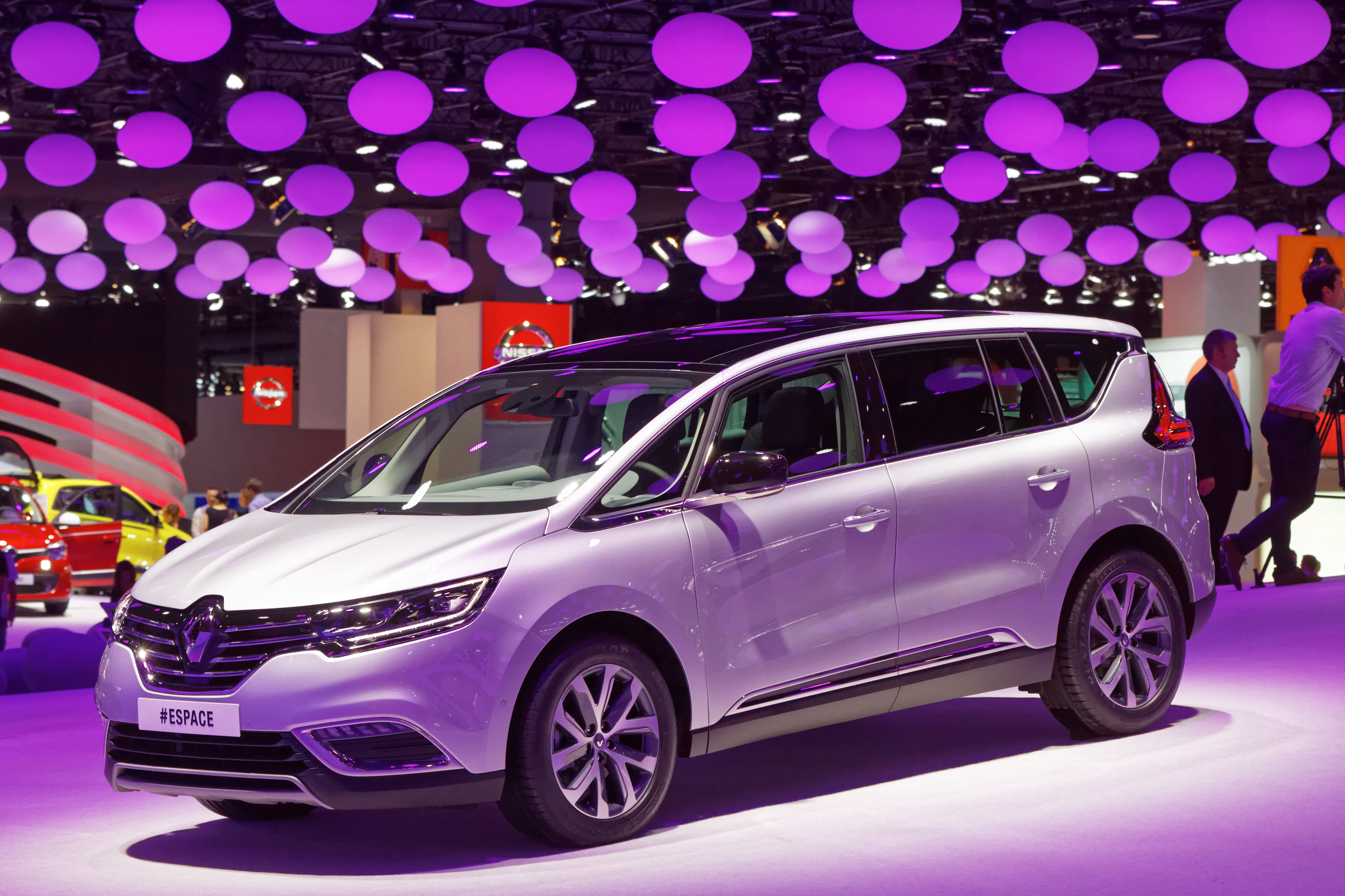 Une Renault Espace présentée lors du mondial de l'automobile de Paris 2014.